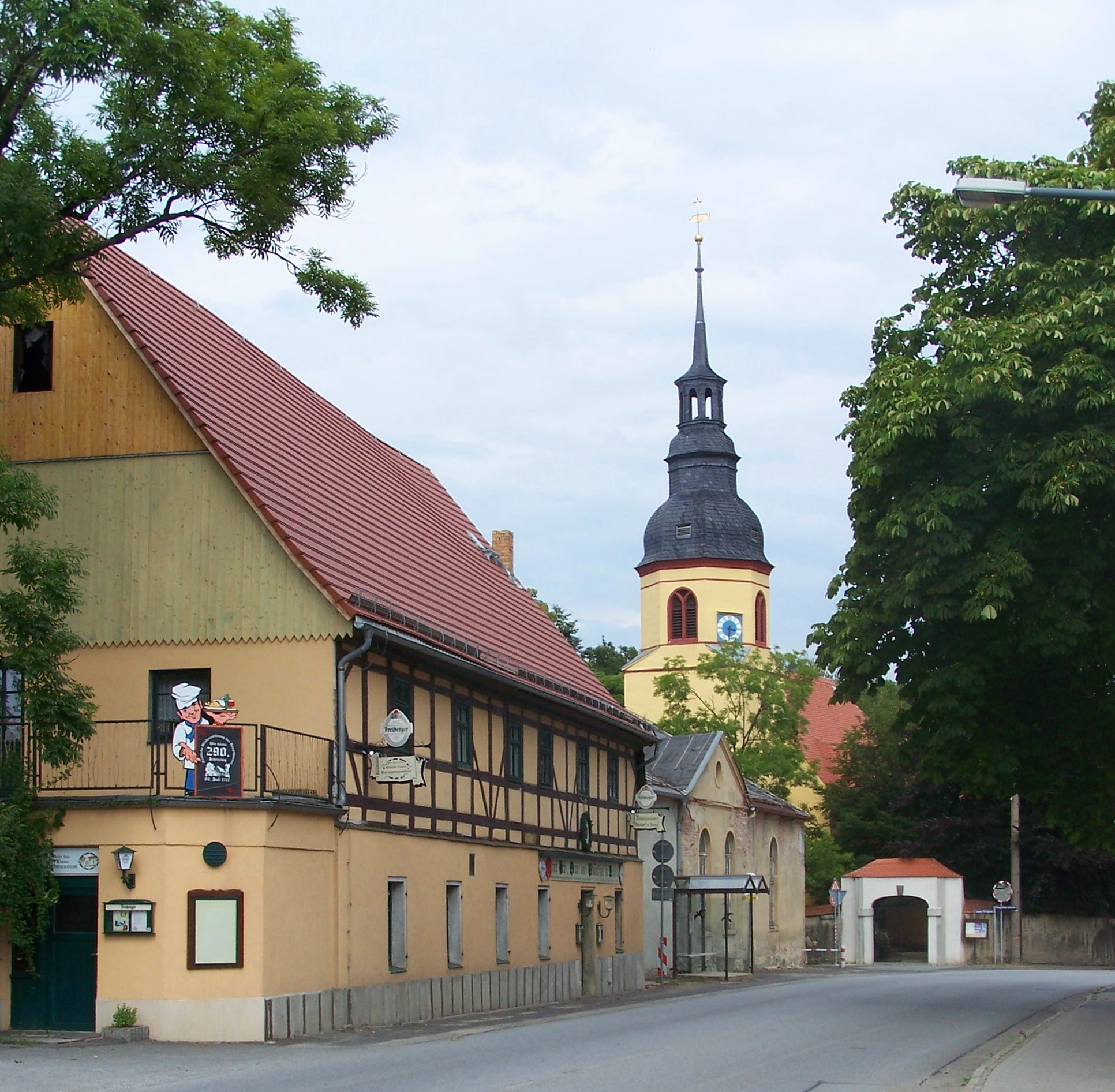 Zentrum des Dresdner Ortsteils Lausa mit Kirche und "Altem Erb-, Brau- und Schänkgut” Lausa